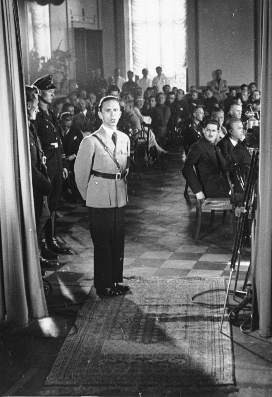 Berlin, Goebbels mit italienischen Jugendlichen Die Avangardisten beim Propaganda-Minister Der Reichsminister für Volksaufklärung und Propaganda, Dr. Goebbels, empfing am 2. August [1933] die in Berlin weilenden 440 italienischen Avangardisten. Die jungen Italiener marschierten mit ihrer Musikkapelle durch das Brandenburger Tor zum Propaganda-Ministerium, wo Reichsminister Dr. Goebbels sie im Namen der Reichsregierung herzlich begrüßte und auf die enge Verbundenheit zwischen deutscher und italienischer Jugend hinwies. UBz.: Minister Dr. Goebbels während seiner Ansprache. [Besuch von Jugendlichen der Opera Nazionale Balilla (Jugendorganisation der Faschistischen Partei Italiens) bei Goebbels] Abgebildete Personen: Goebbels, Joseph: Reichsminister für Volksaufklärung und Propaganda, Gauleiter Berlin, Deutschland